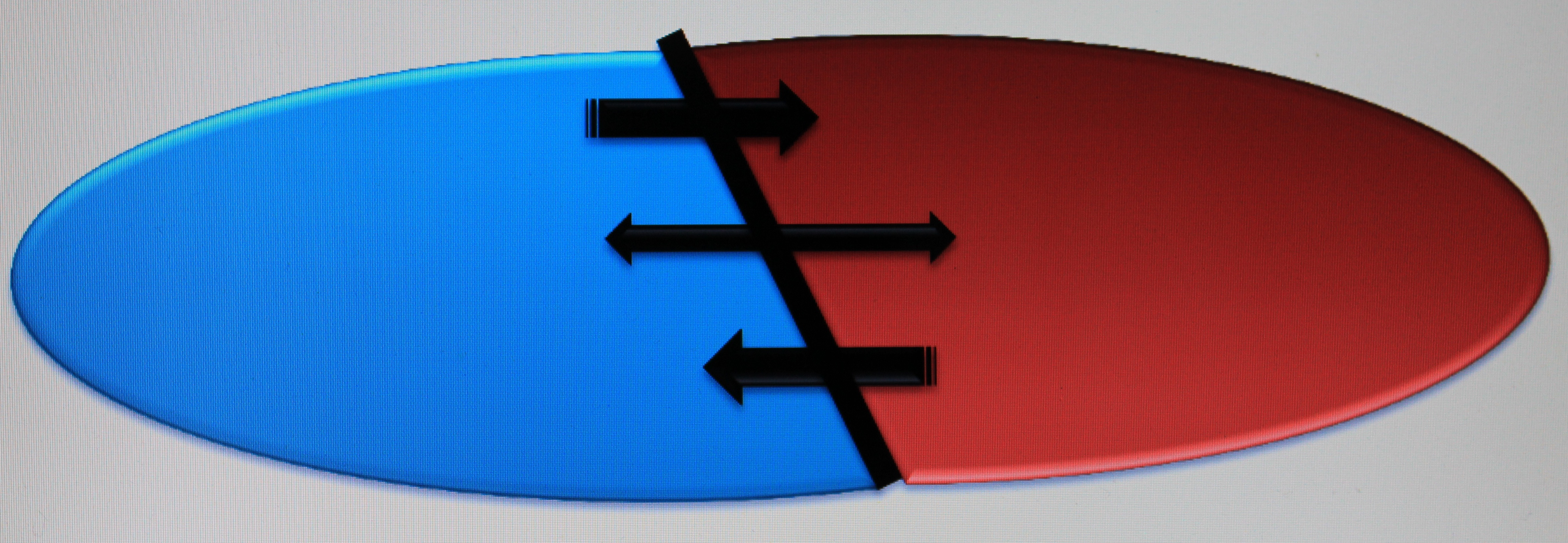 Logo Interfaces